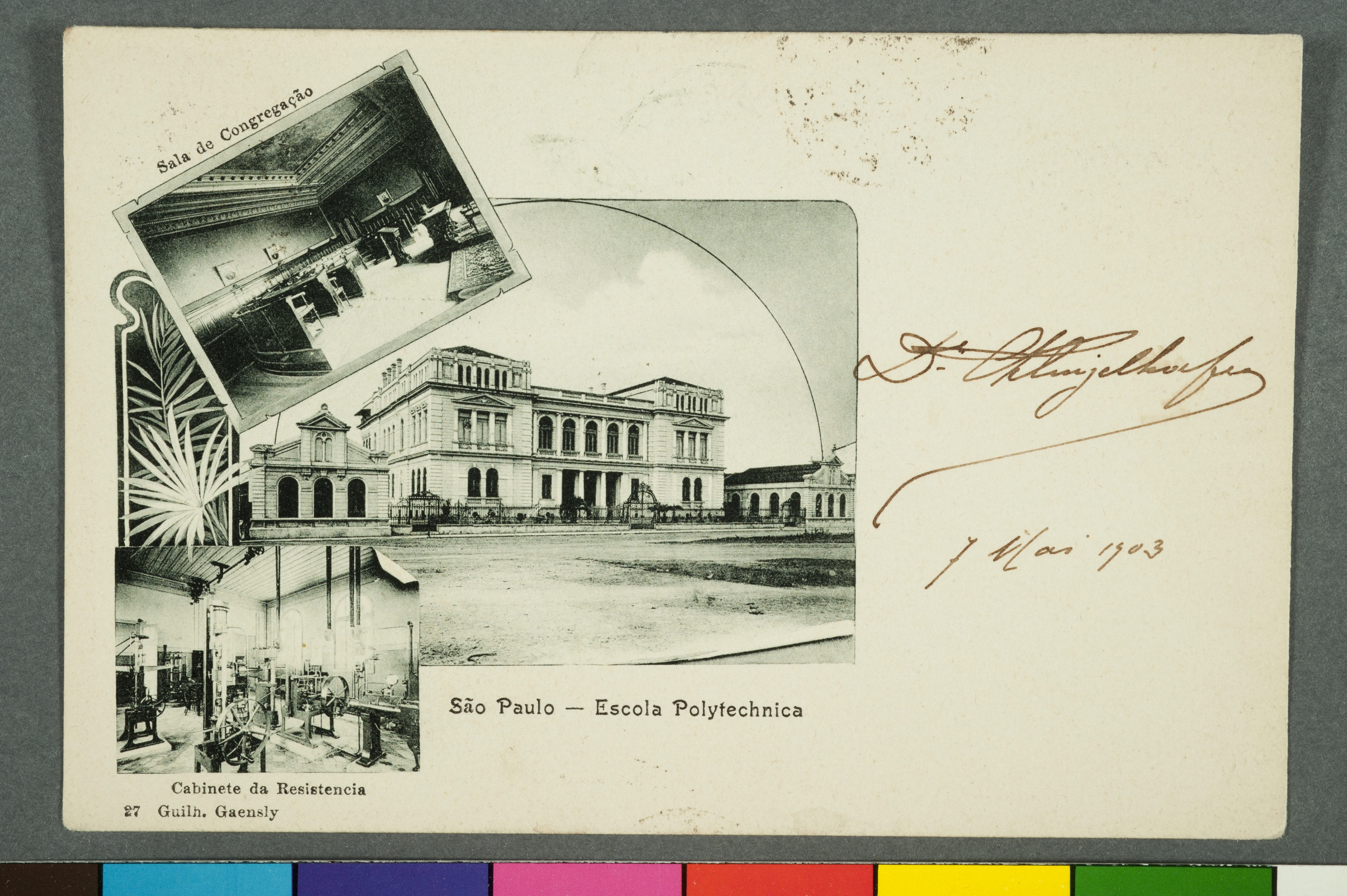 Obra que integra o acervo do Museu Paulista da USP.